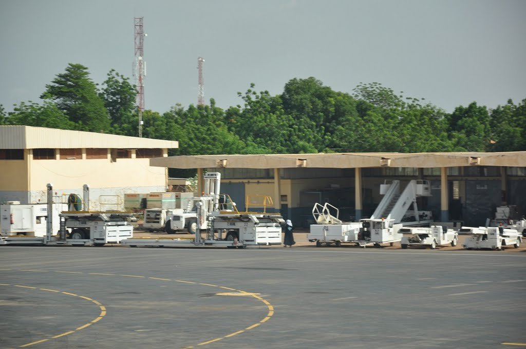 Aeroport Diori Hamani de Niamey Hangard